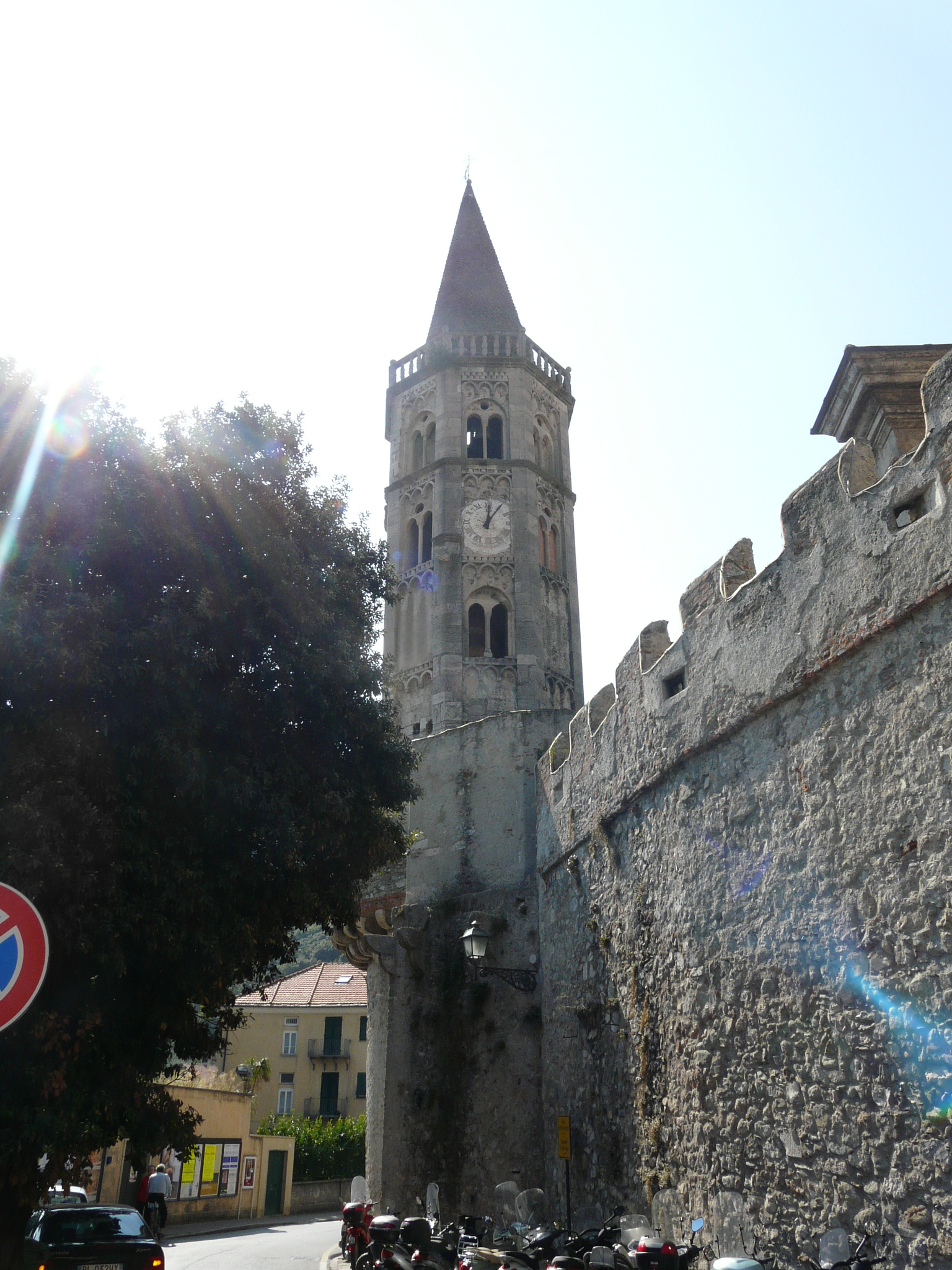 Finalborgo, Finale Ligure, Liguria, Italia Le mura di Finalborgo, Finale Ligure, Liguria, Italia